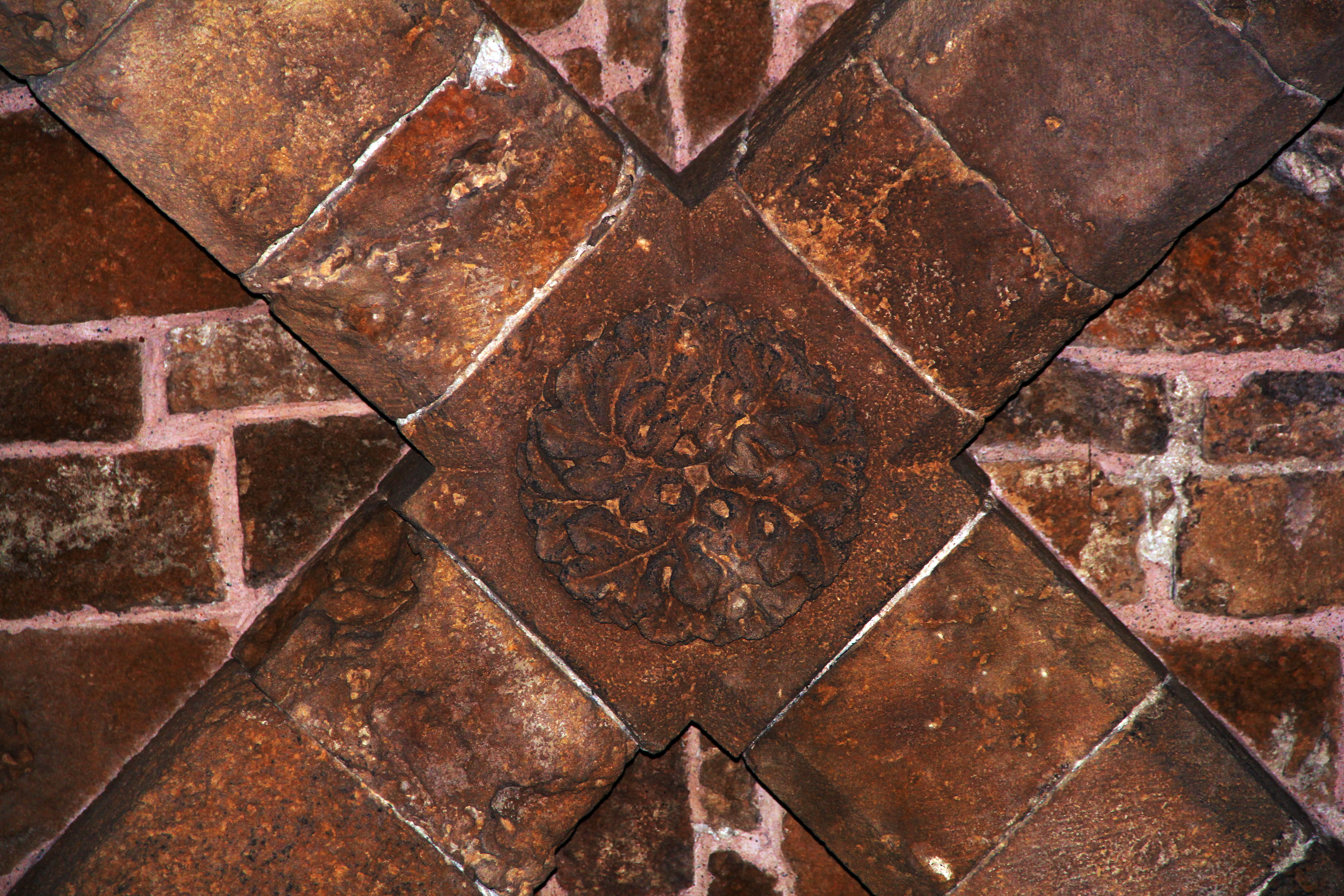 Johanniterkommende Akko: Refektorium im romanisch-gotischen Übergangsstil